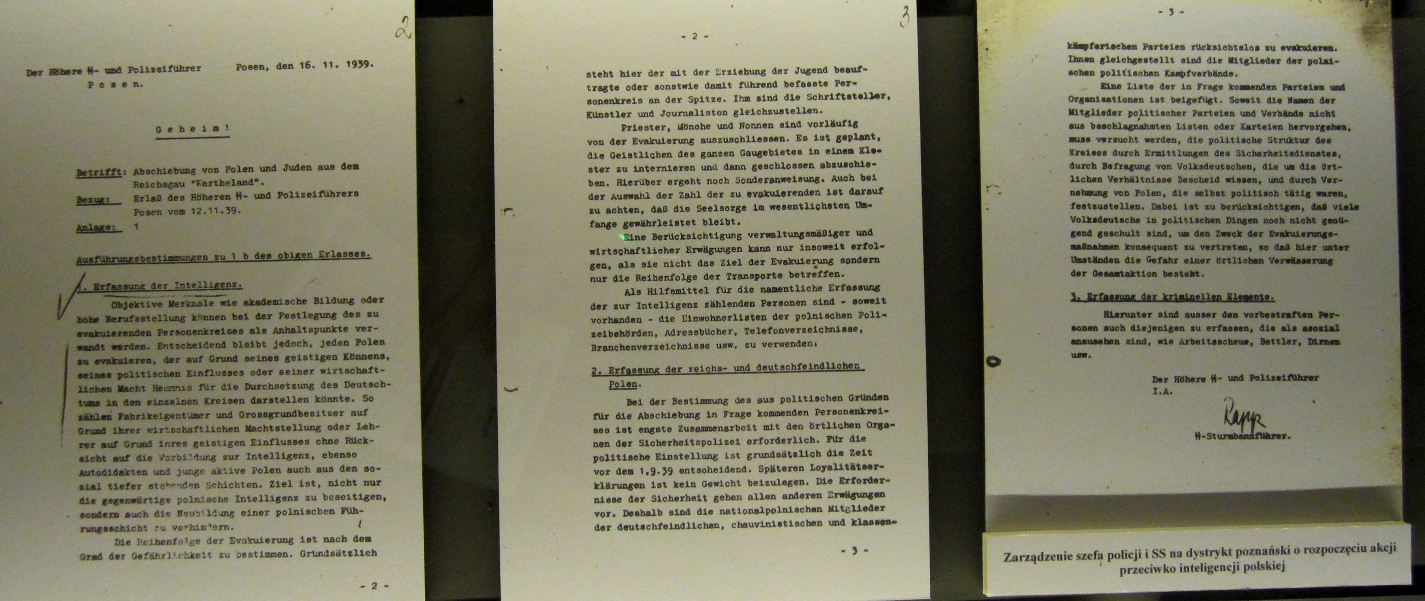 Zarządzenie szefa policji i SS na dystrykt poznański o rozpoczęciu akcji przeciw inteligencji (zbiory na Forcie VII w Poznaniu). 16.11.1939